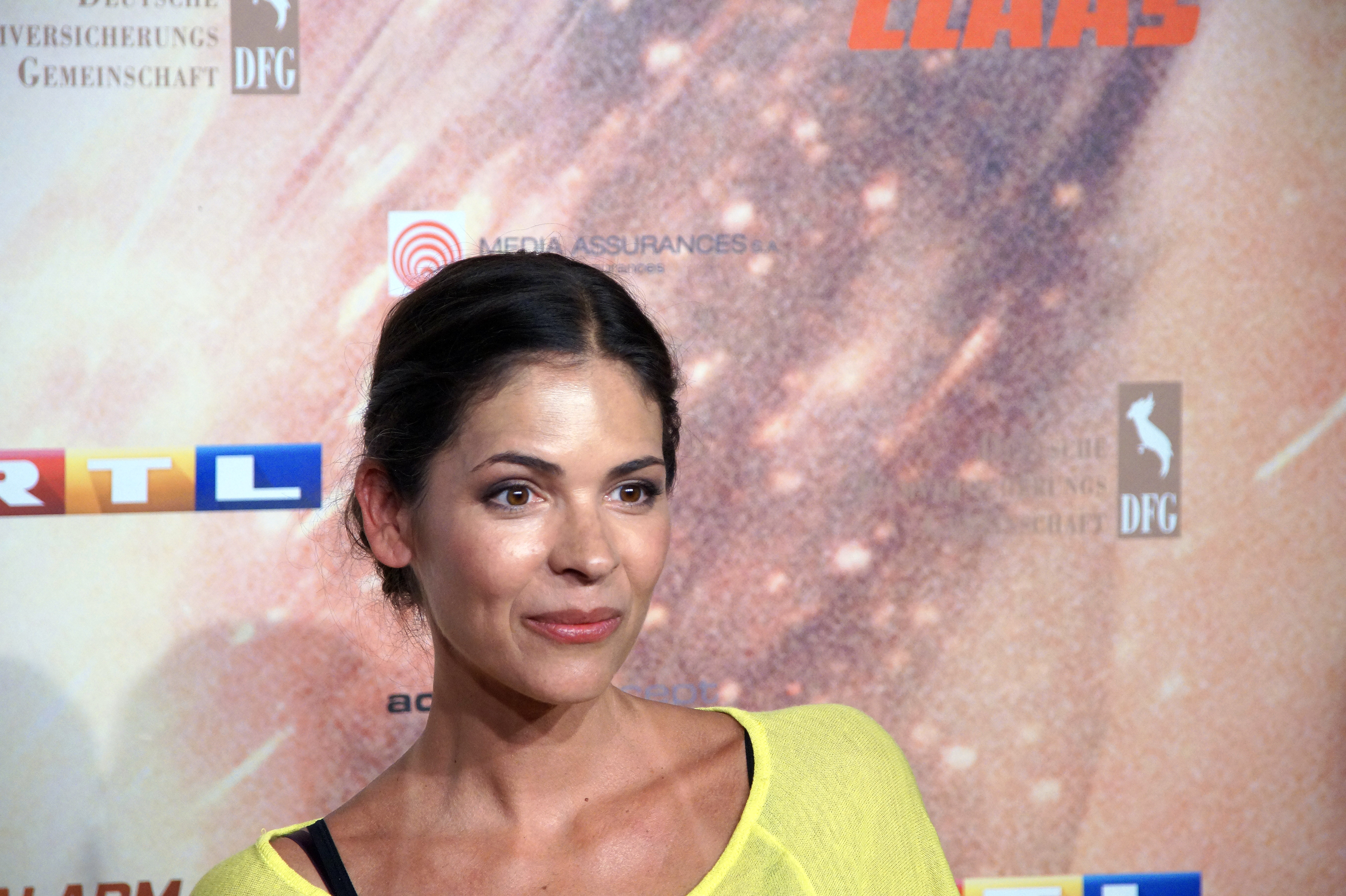 Katja Woywood bei der Premiere von der 300. Folge 'Alarm für Cobra 11', April 2016.